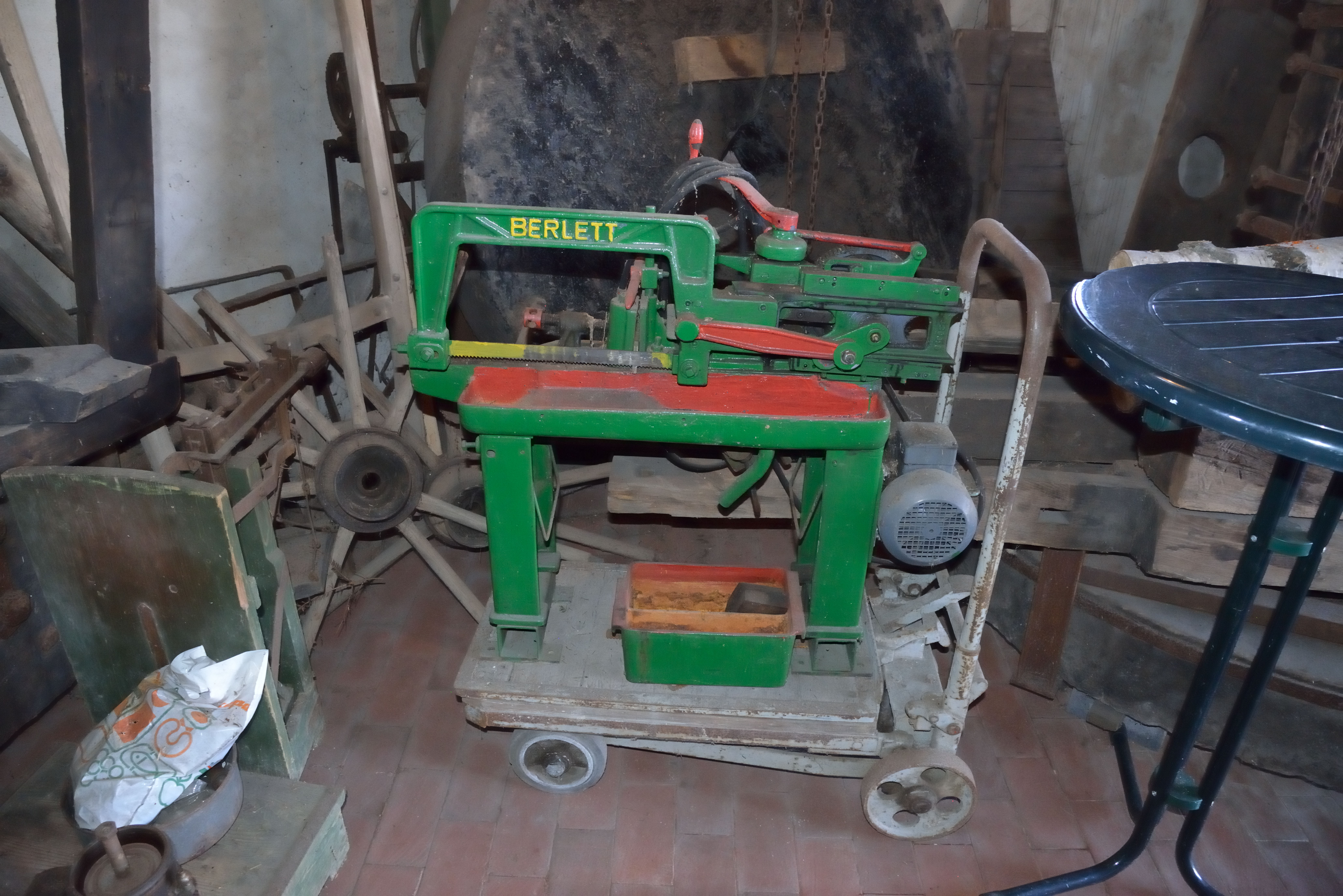 Windmühle Messlingen, Duitsland, ijzerzaagmachine